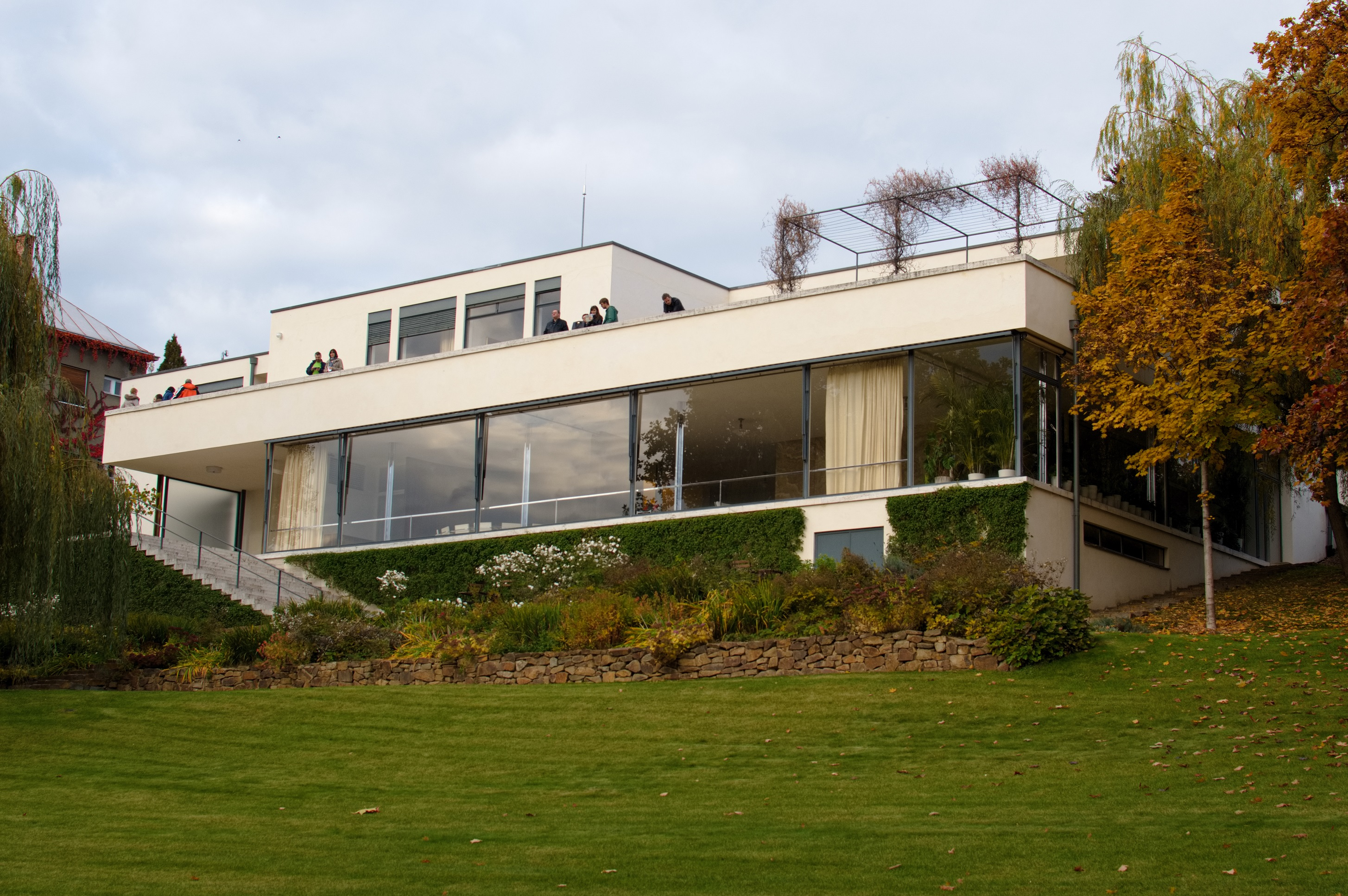 Fotografie zahradního průčelí vily Tugendhat